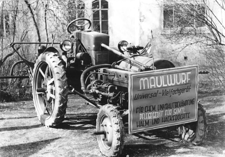 Apolda, Vorführung des Schleppers "Maulwurf" Zentralbild Wittig TBD 22.3.1954 Muster- und Verkaufsmesse in Apolda. Die Muster und Verkaufsmesse in Apolda, die innerhalb des Nationalen Aufbauwerkes 1954 durchgeführt wurde, zählt täglich Tausende von Besuchern. Die Messe ist ein große Leistungsschau der Ortlichen Industrie und des Handwerks, diedie Qualität ihrer Produktion in der letzten Zeit bedeutend erhöht haben. UBz: Die MTS Apolda-Heusdorf war mit verschiedener Bodenarbeitungsgeräten und Maschinen vertreten, um den werktätigen Bauern zu zeigen, mit welchen Maschinen und Geräten sie ihre Felder bearbeiten. Der "Maulwurf", ein Universalvielfachgerät.